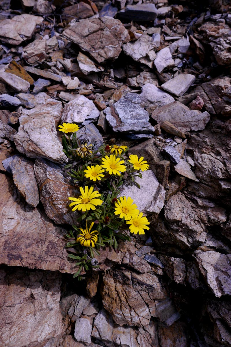 Asteriscus maritimus en El Gorguel (Cartagena, España)